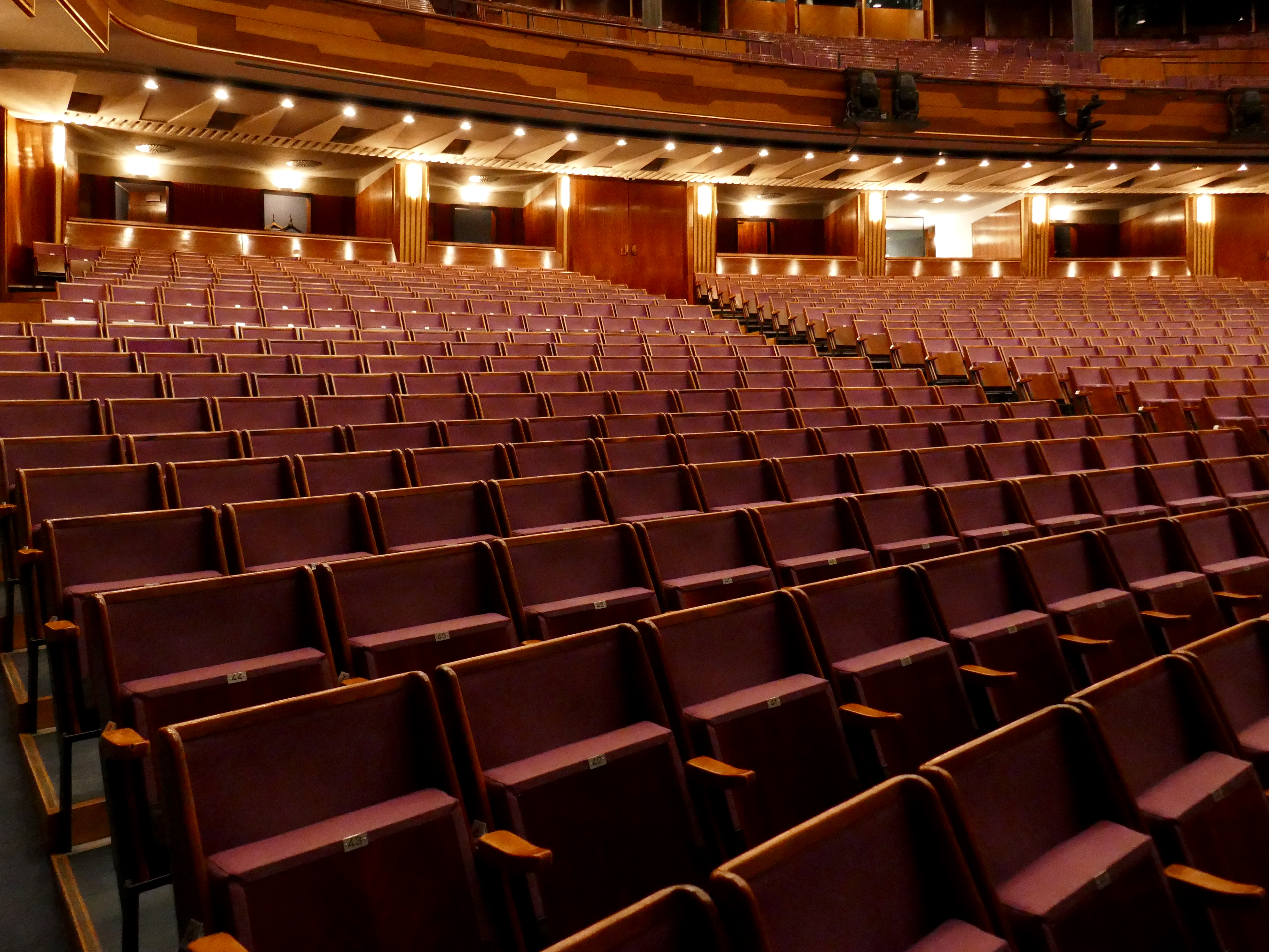 Großes Festspielhaus Salzburg, Bestuhlung, Zuschauersaal.